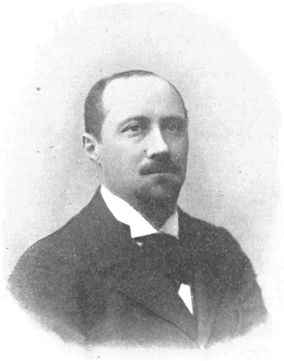 "Jean Drault, rédacteur à La Libre Parole, membre de l'Association syndicale professionnelle des journalistes parlementaires".